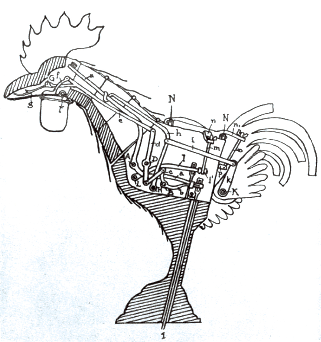 Illustration de L'horloge astronomique de la cathédrale de Strasbourg.